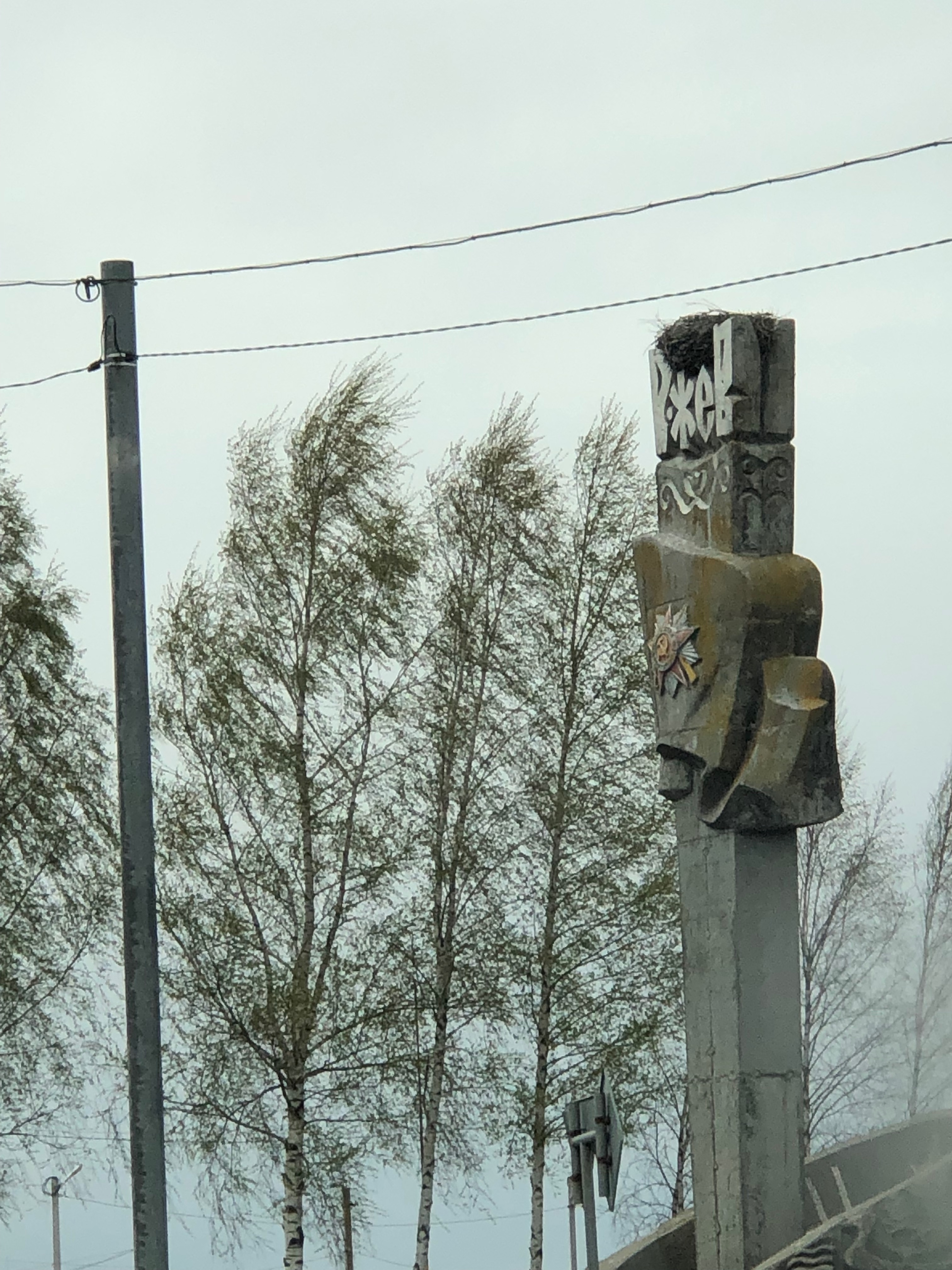 Поворот на Ржев с трассы М9